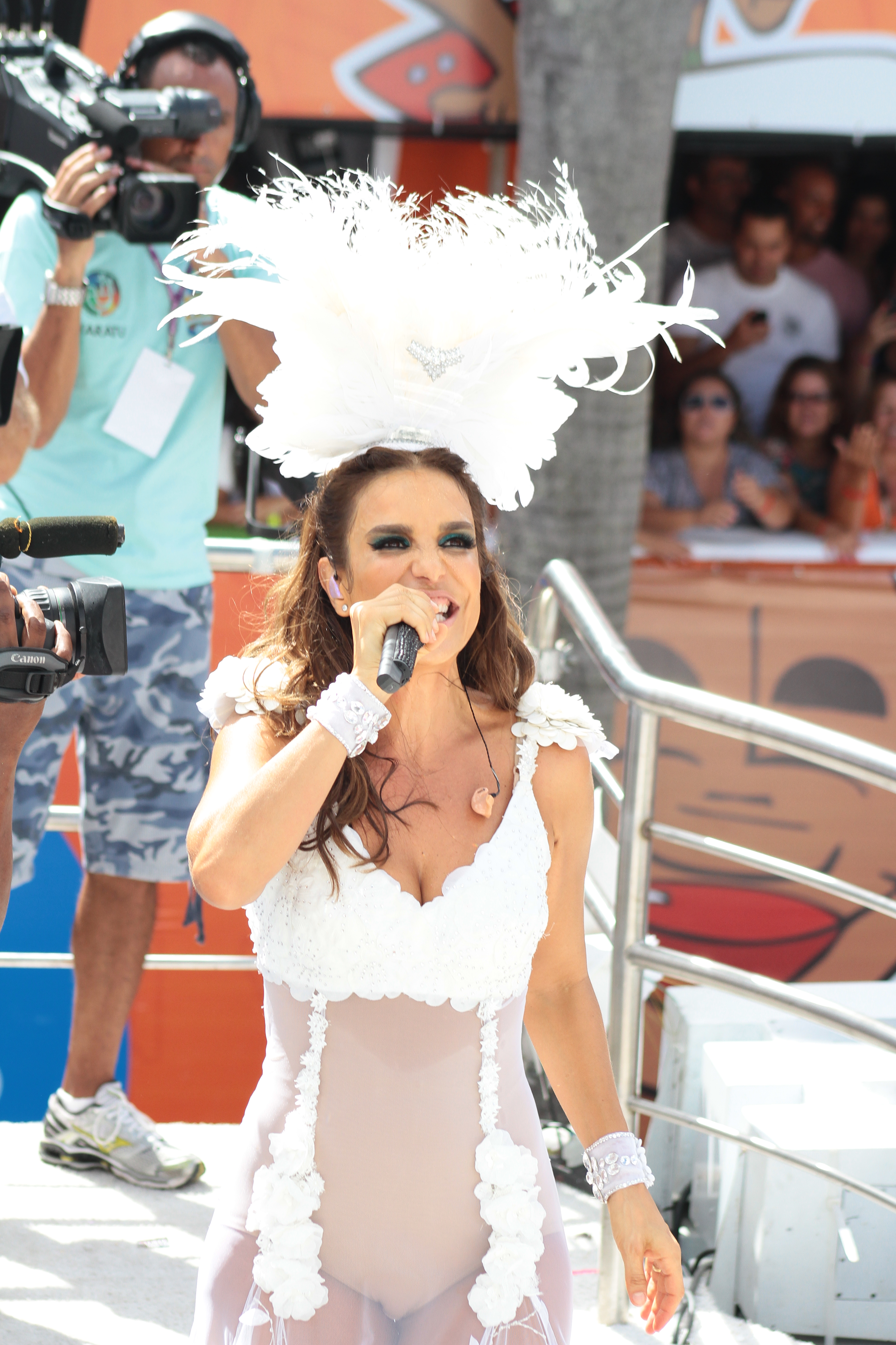 Ivete no Carnaval 2013, em Salvador.